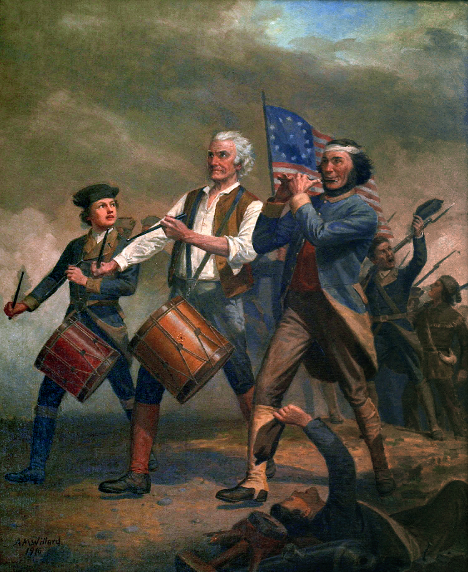 Deux tambours et un fifre ouvrent la marche d'une troupe d'insurgés pendant la guerre d'indépendance